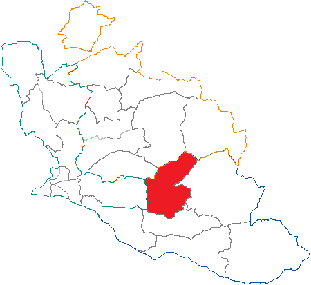 Situation du canton dans le département de Vaucluse (France)